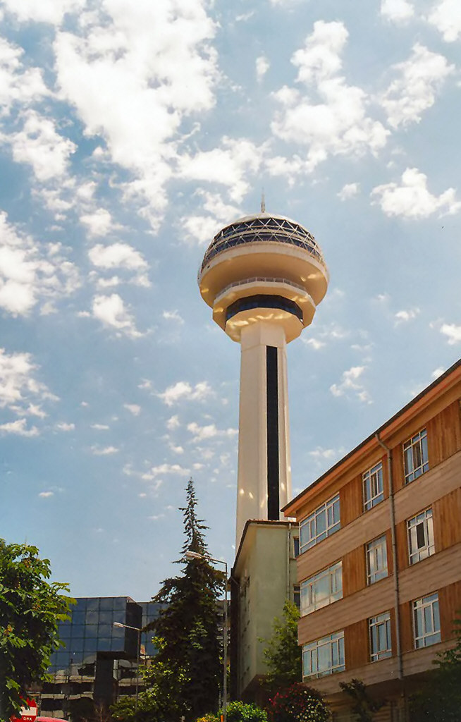 Ata-Kule